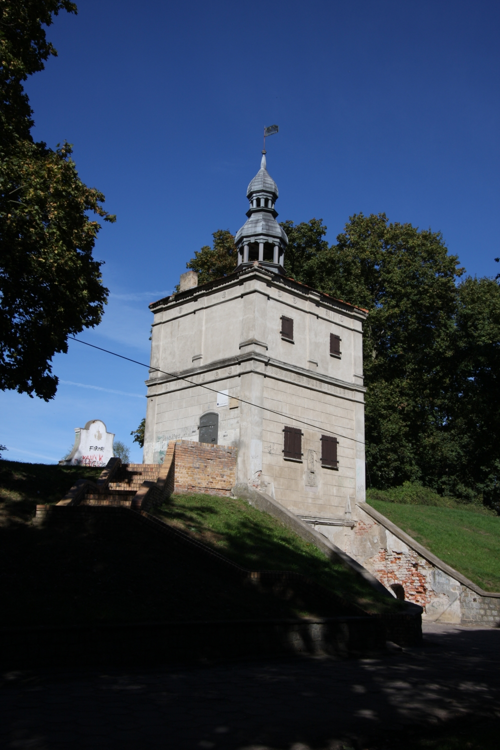 Zbąszyń, wieża bramna, w zespole zamkowym, mur., XVII